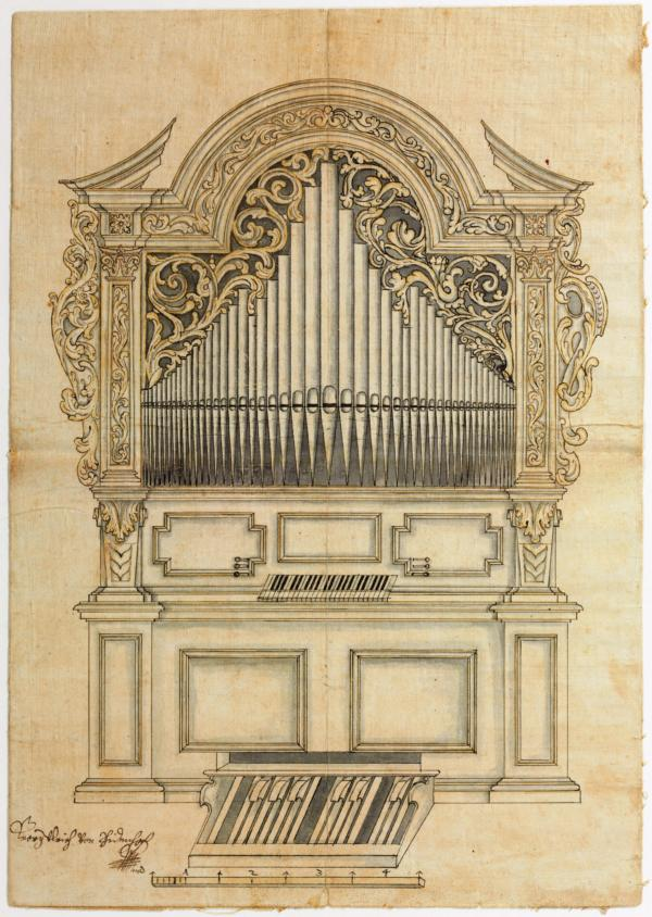 Alternatim-Entwurf für die Orgel der Erhardkirche Salzburg Nonntal 1687-88. Zwei Künstler am Werk, vielleicht Zugalli und Egedacher. 1716-17 für die Orgel in Kirchental wiederverwendet